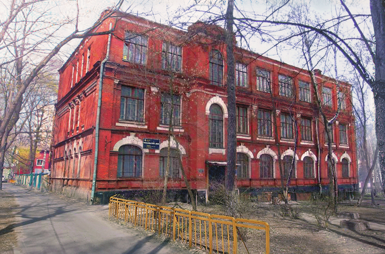 Edificio de la Casa Editorial MIR